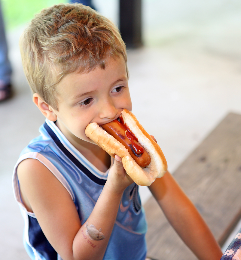 bestIMG_7182